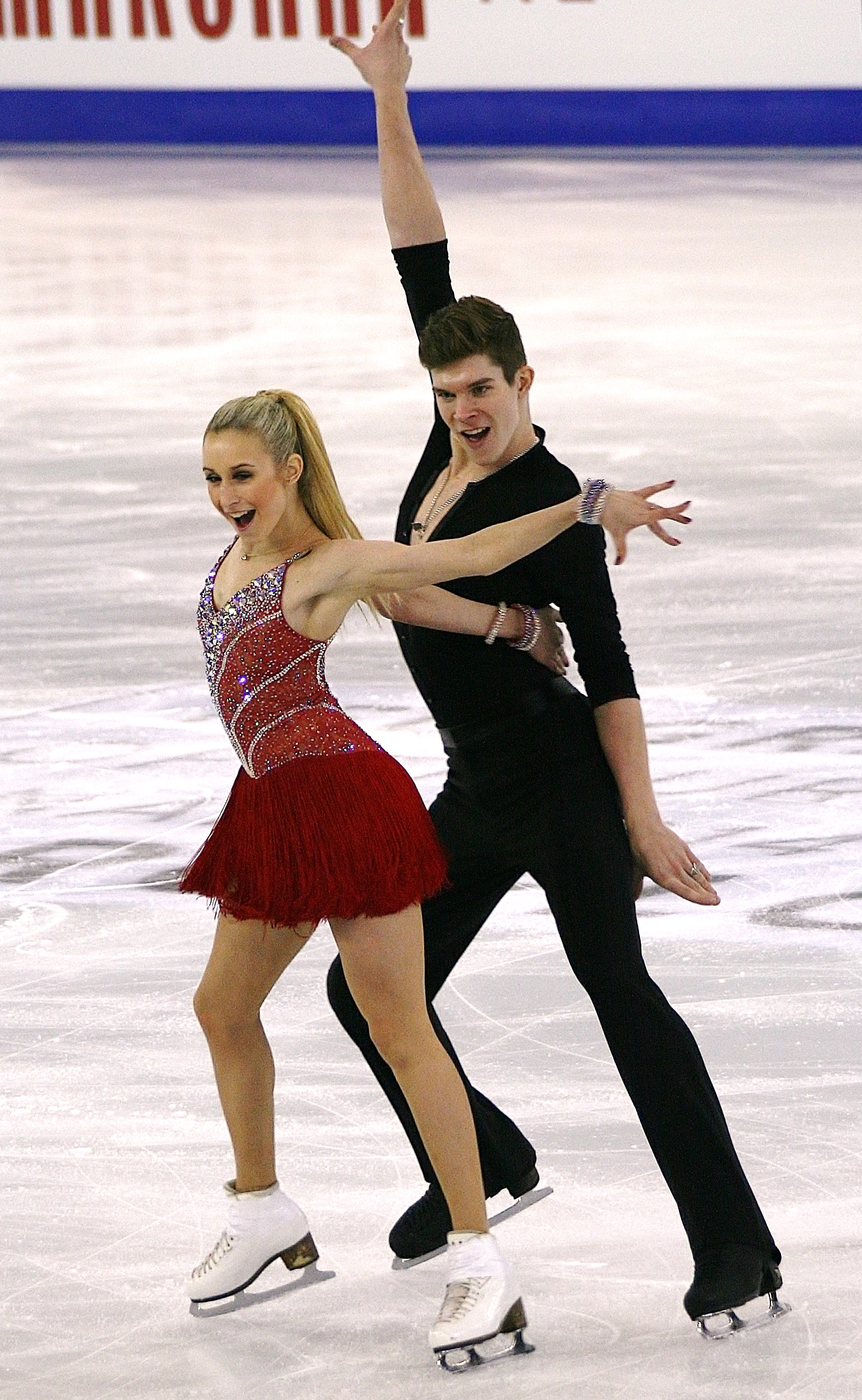 Анна Яновская и Сергей Мозгов (Россия) на финале Гран-при среди юниоров 2014-2015.